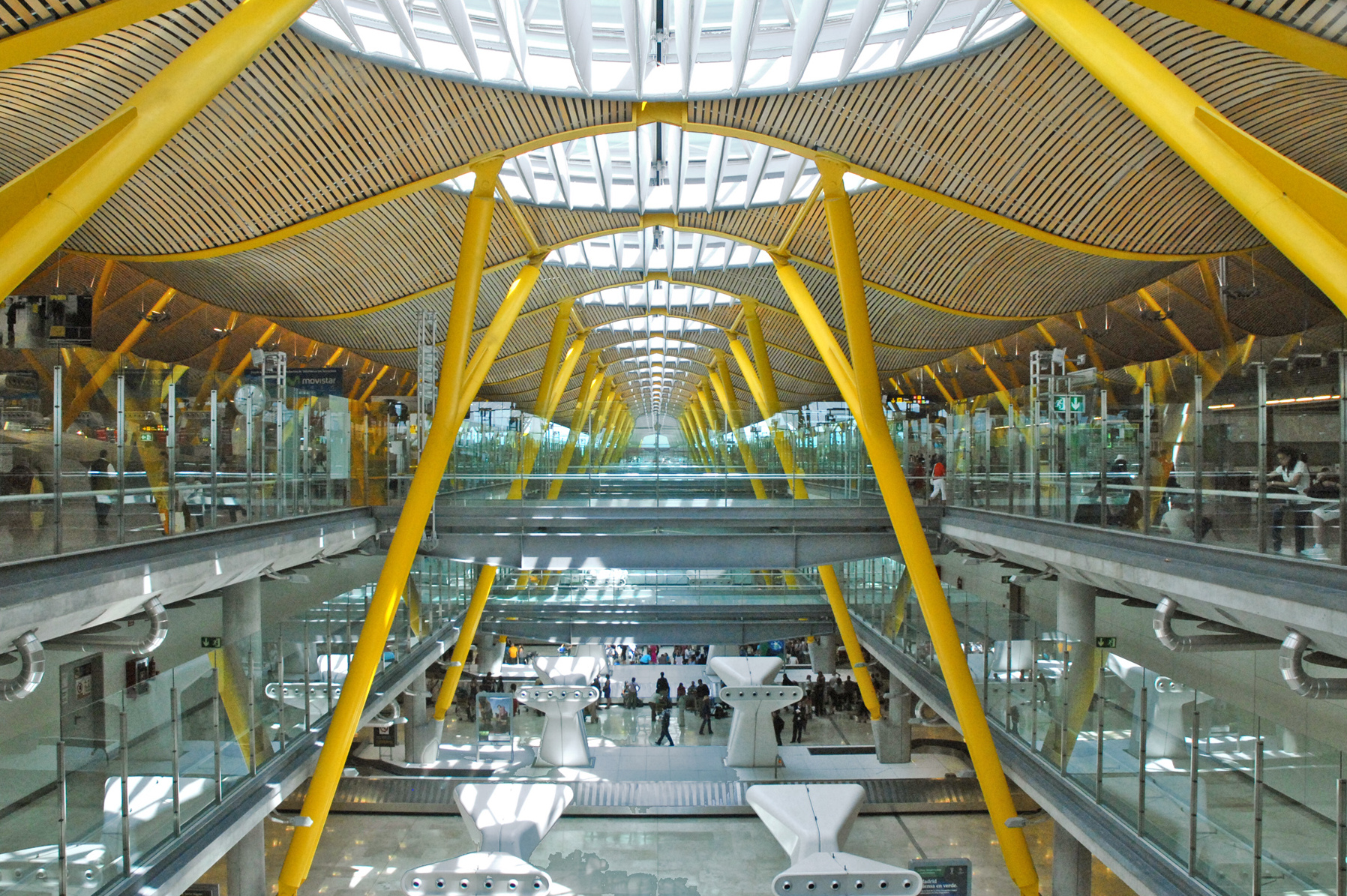 Barajas Airport in Madrid, was designed by Richard Rogers Partnership. Voir aussi l'album de l'exposition Richard Rogers + architectes au Centre G. Pompidou à Paris en 2007. voir aussi la présentation du terminal T4 et T4S sur Mimoa Barajas